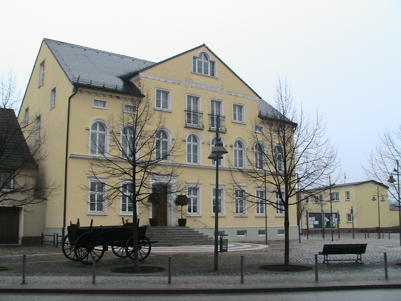 Rathaus der Gemeinde FörderstedtCanon MVX250i (Fotofunktion)